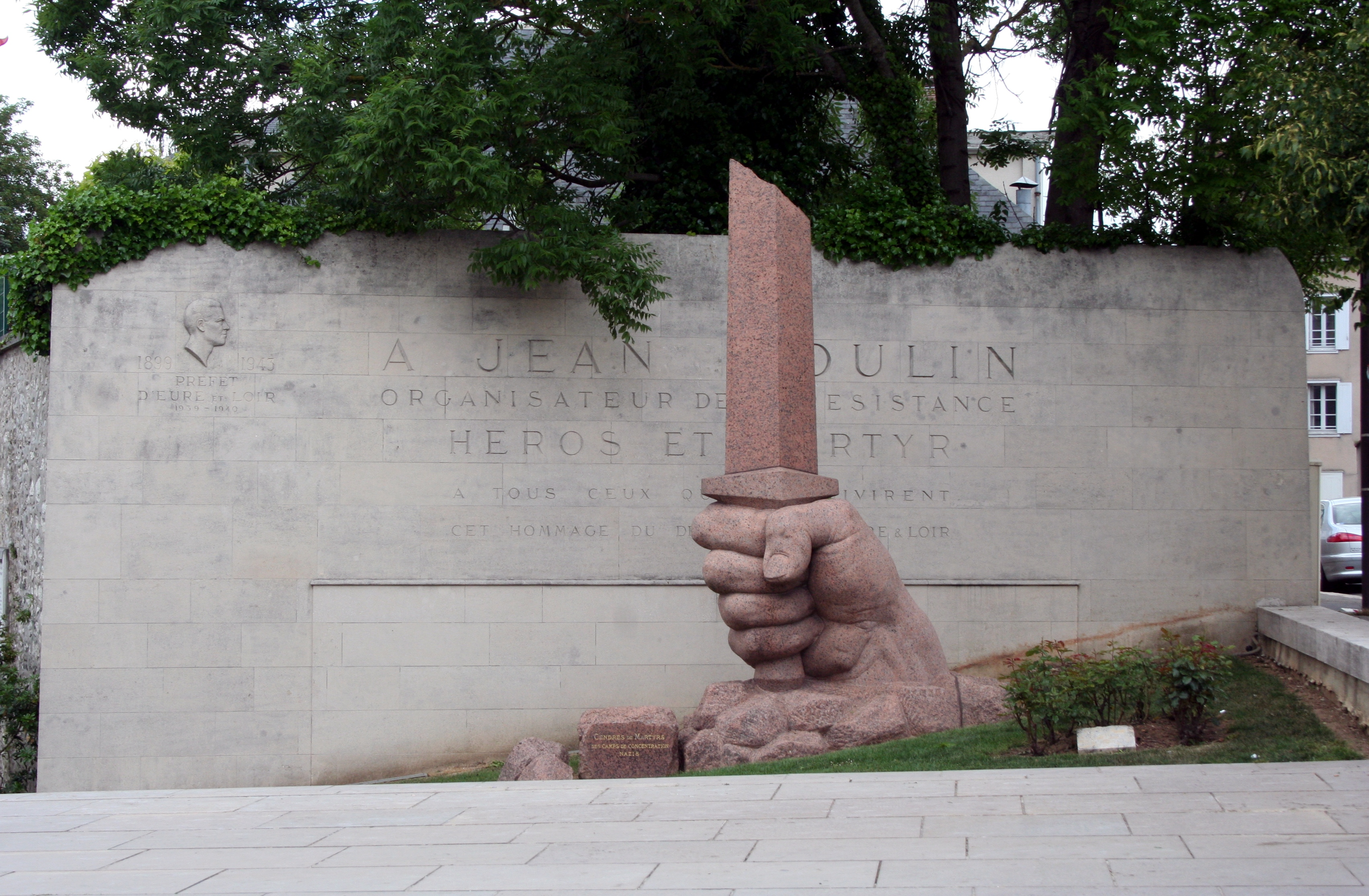 hommage à Jean Moulin, Chartres, Eure-et-Loir, France.